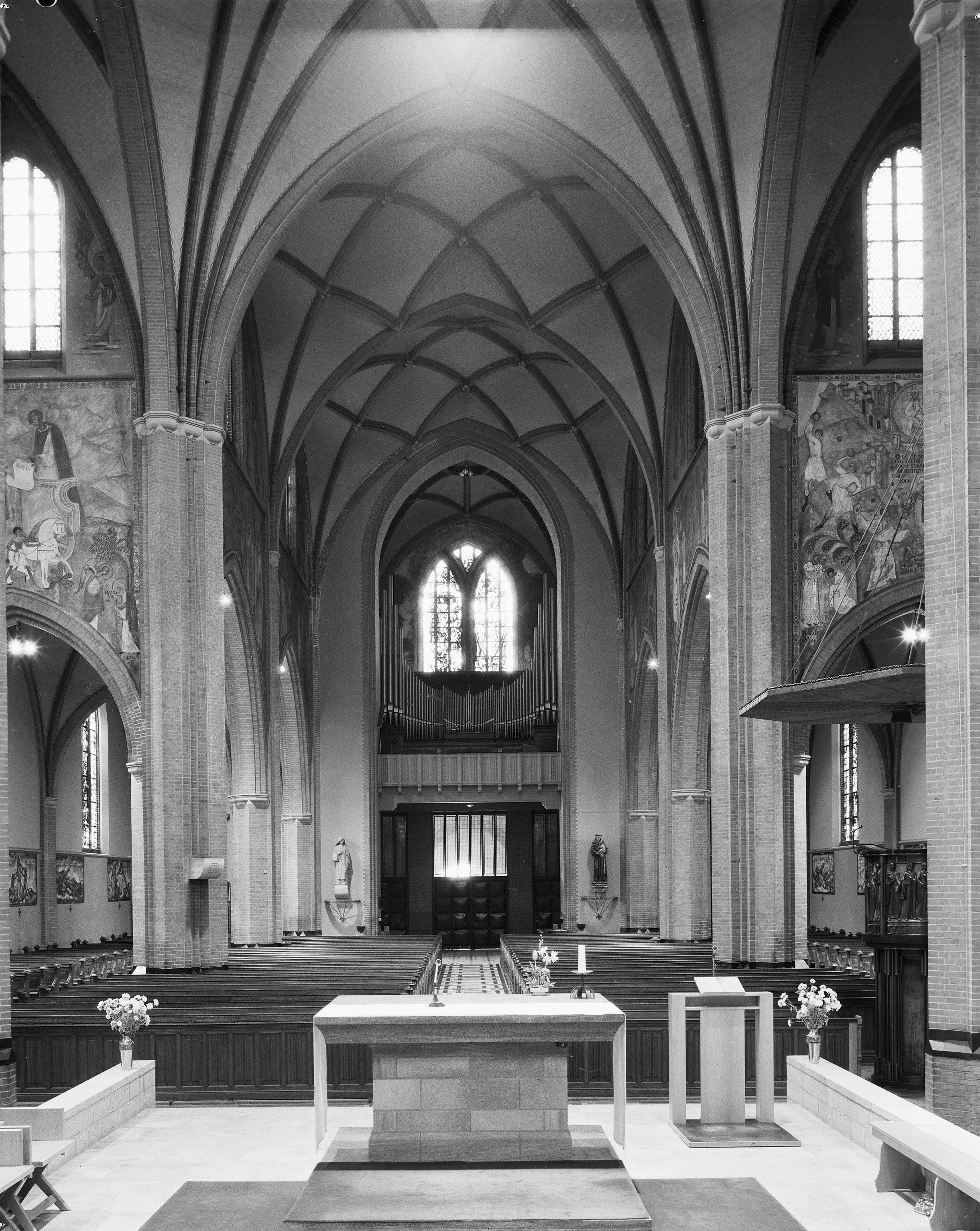 R.K.Kerk en Toren St.Callixtuskerk: interieur naar het westen